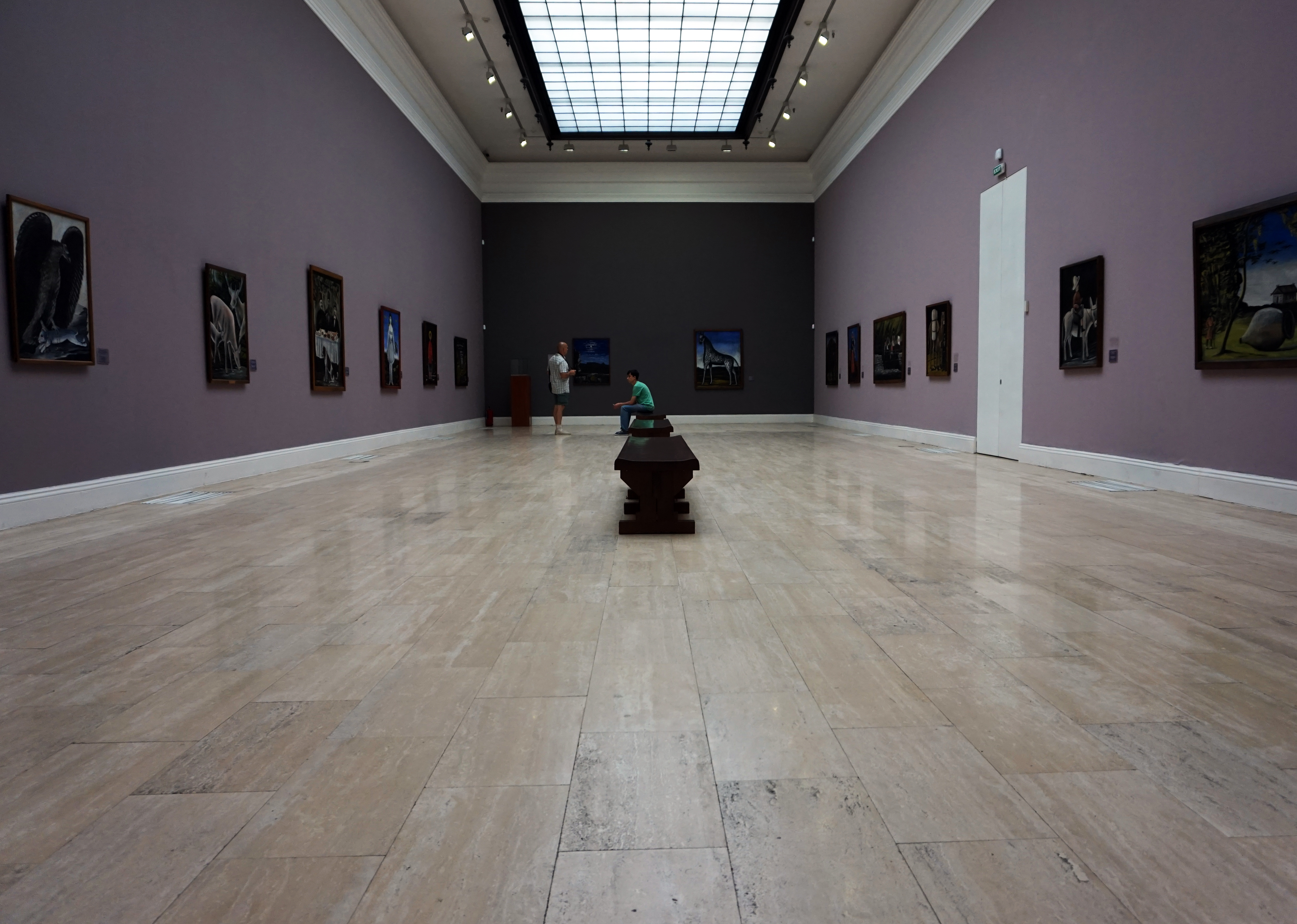 格鲁吉亚国家美术馆。